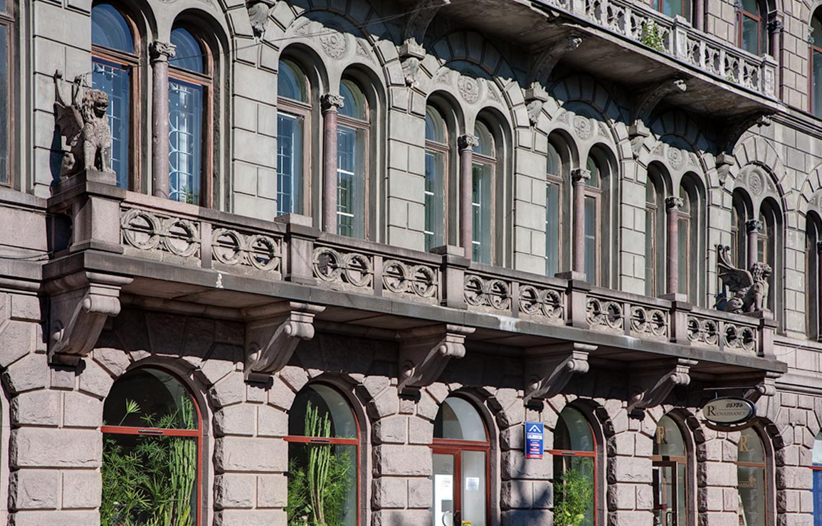 ул.Пионерская,4; 22.08.2009